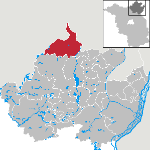 Uckerland in Brandenburg, Landkreis Uckermark